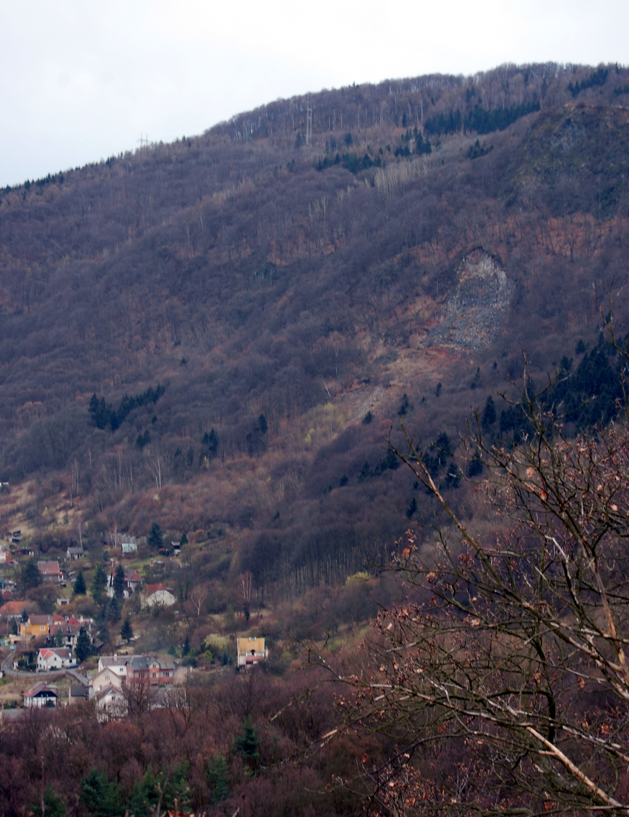 Svahový sesuv na Čertovce ve Vaňově